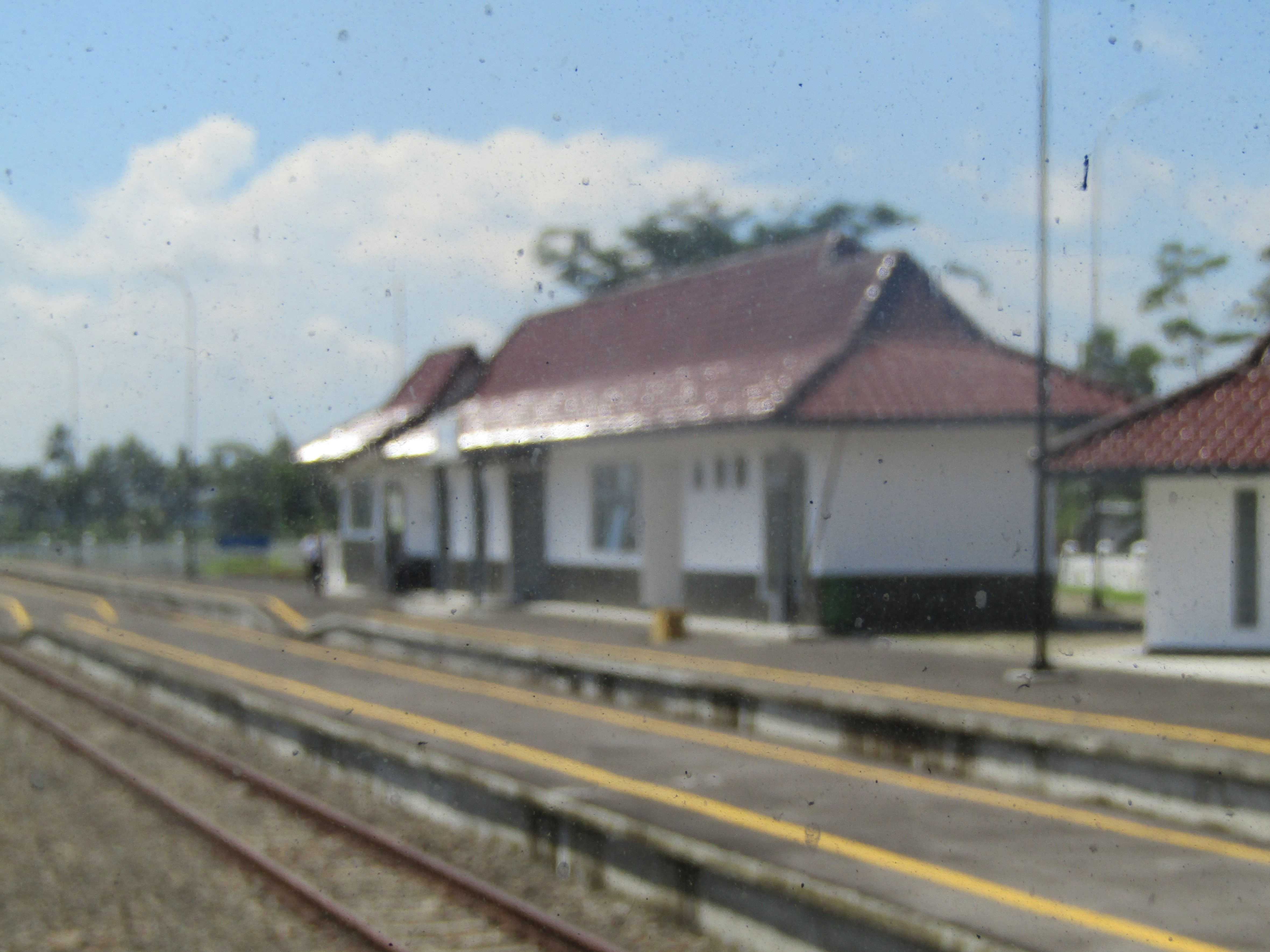 Tampak peron bangunan Stasiun Kebasen Baru, 2019